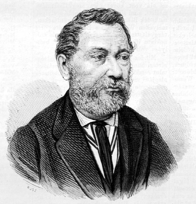 Lovassy László (1815–1892) jogász, a Társalkodási Egylet elnöke portréja. Rusz Károly metszete